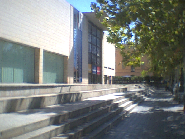 Tema: Monumentos y museos se Valencia Ciudad